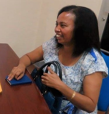 Ex-Vice Ministra da Saúde e actual Assessora da Ministra da Saude; a Dra. Natália de Araújo